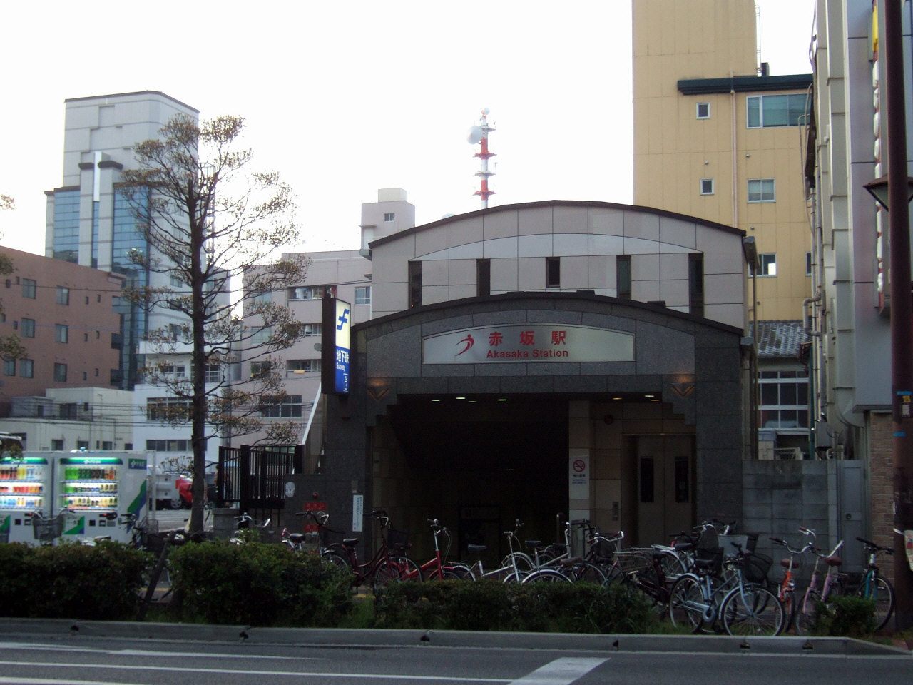 福岡市地下鉄赤坂駅（Akasaka Station,Fukuoka City Subway）